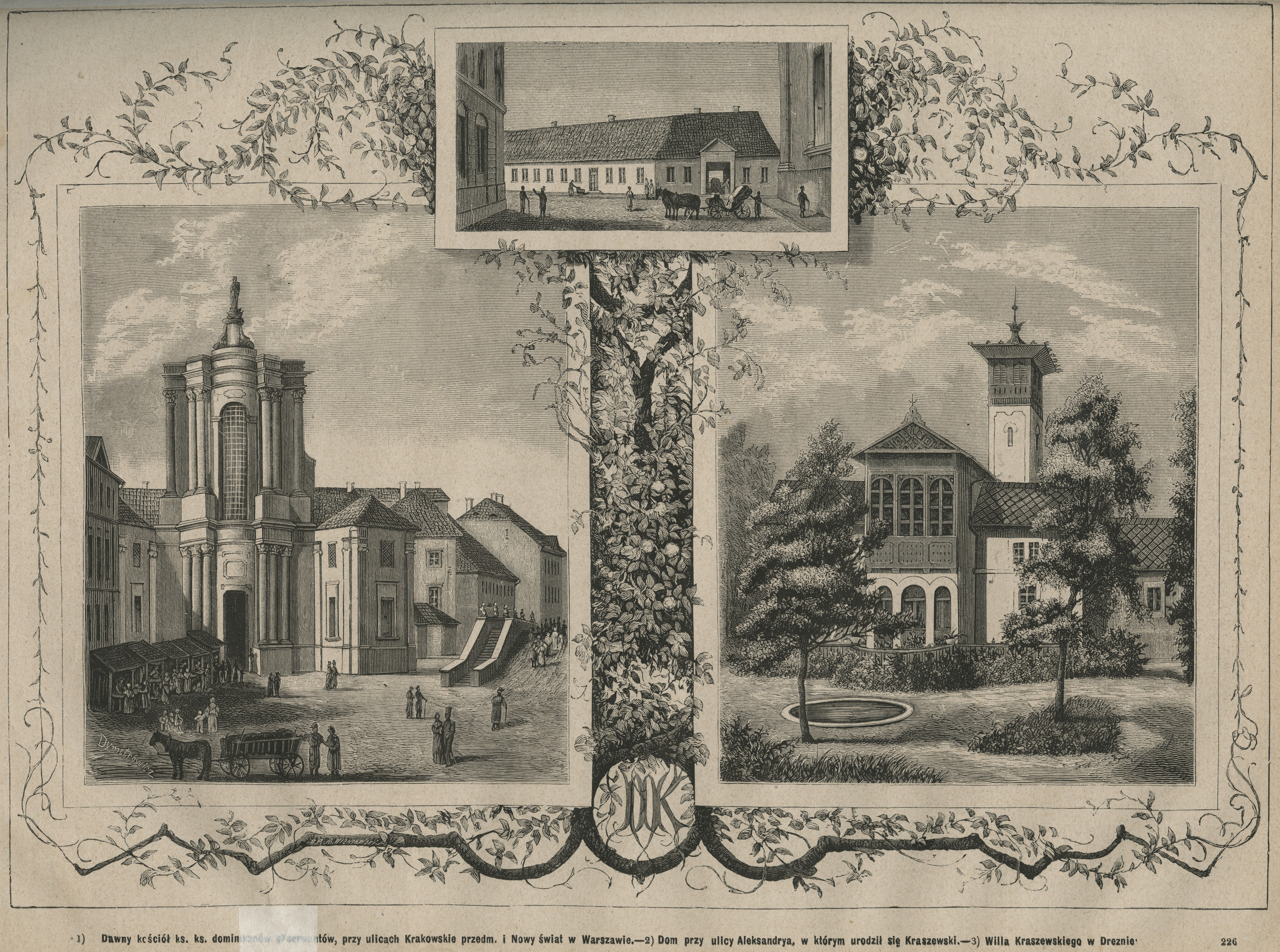 Dawny kościół ks. ks. dominikanów obserwantów, przy ulicach Krakowskie przedm. i Nowy Świat w Warszawie